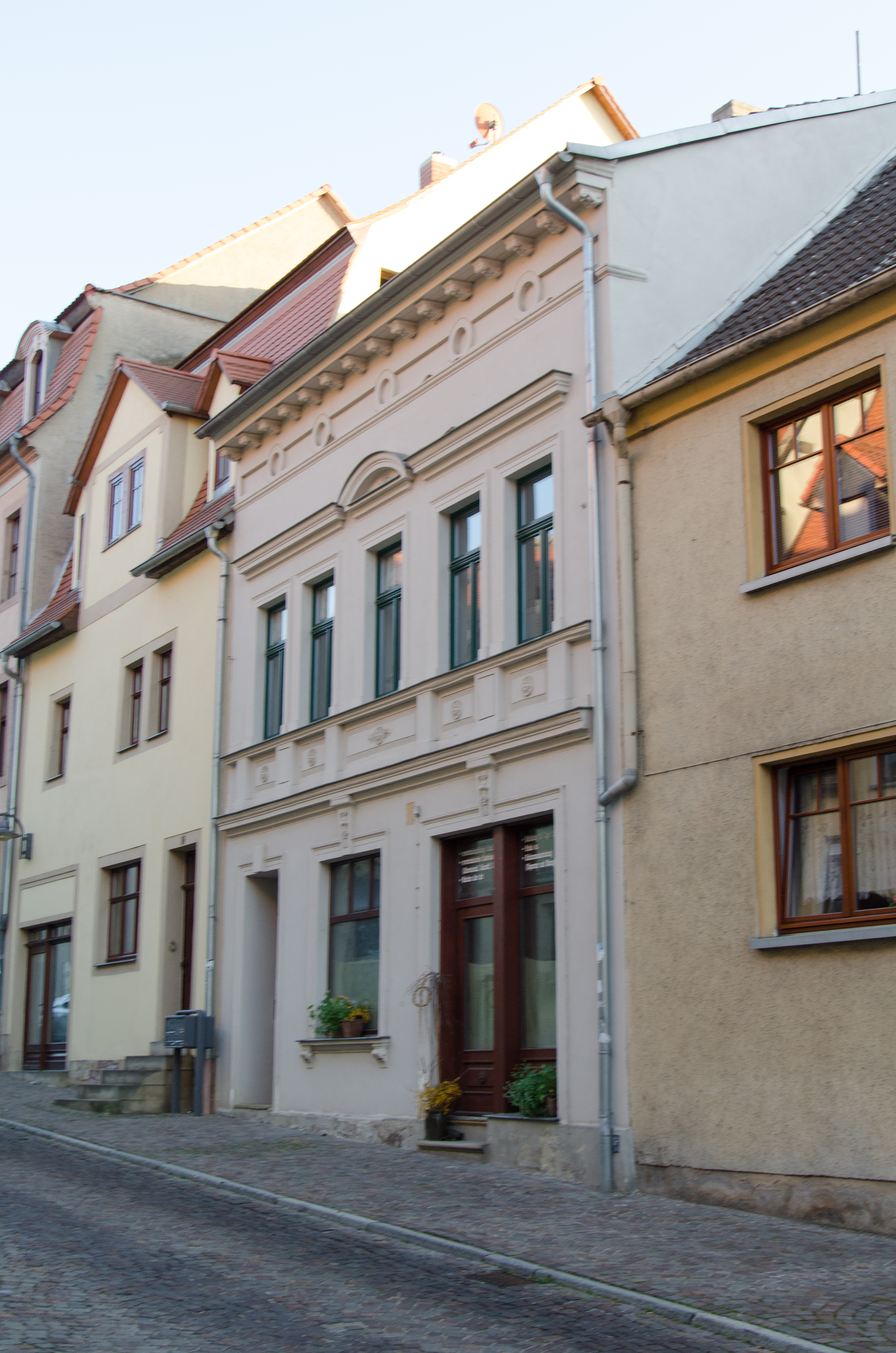 Querfurt, Nebraer Straße 14